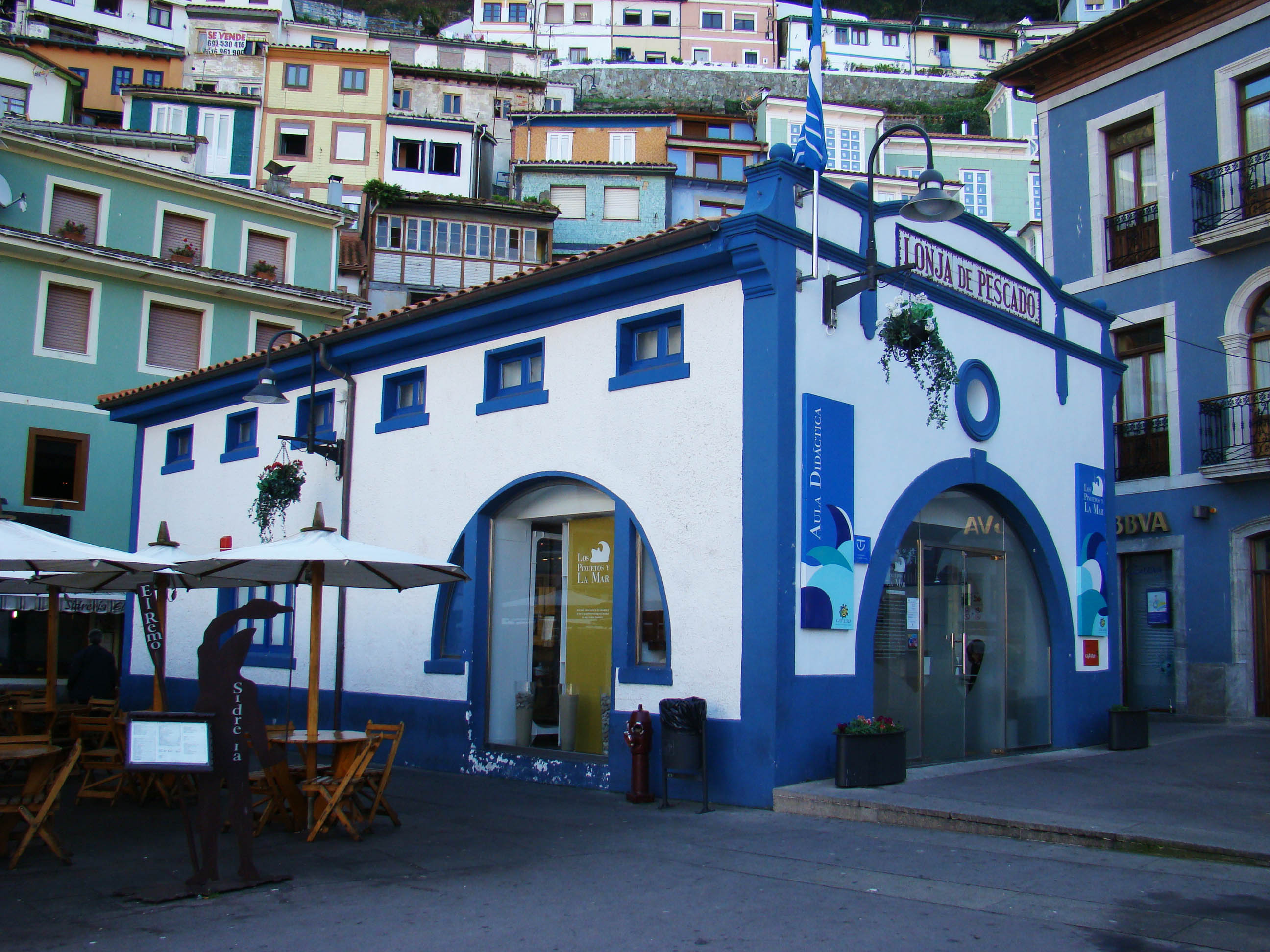 Cudillero es un concejo y parroquia del Principado de Asturias (España). Es un importante puerto pesquero. En la foto, la Lonja de pescado.